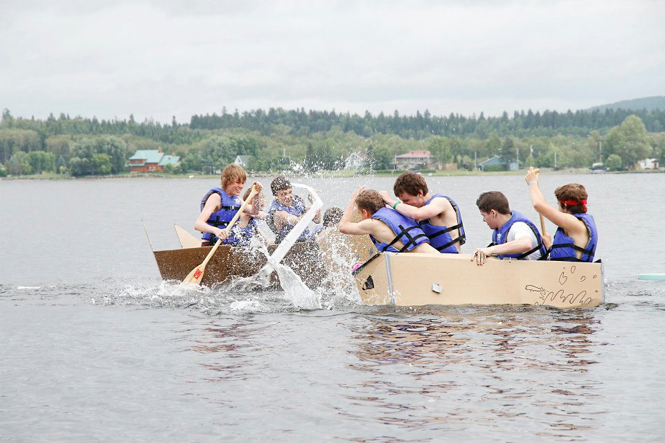 Les Cartonages sur le lac